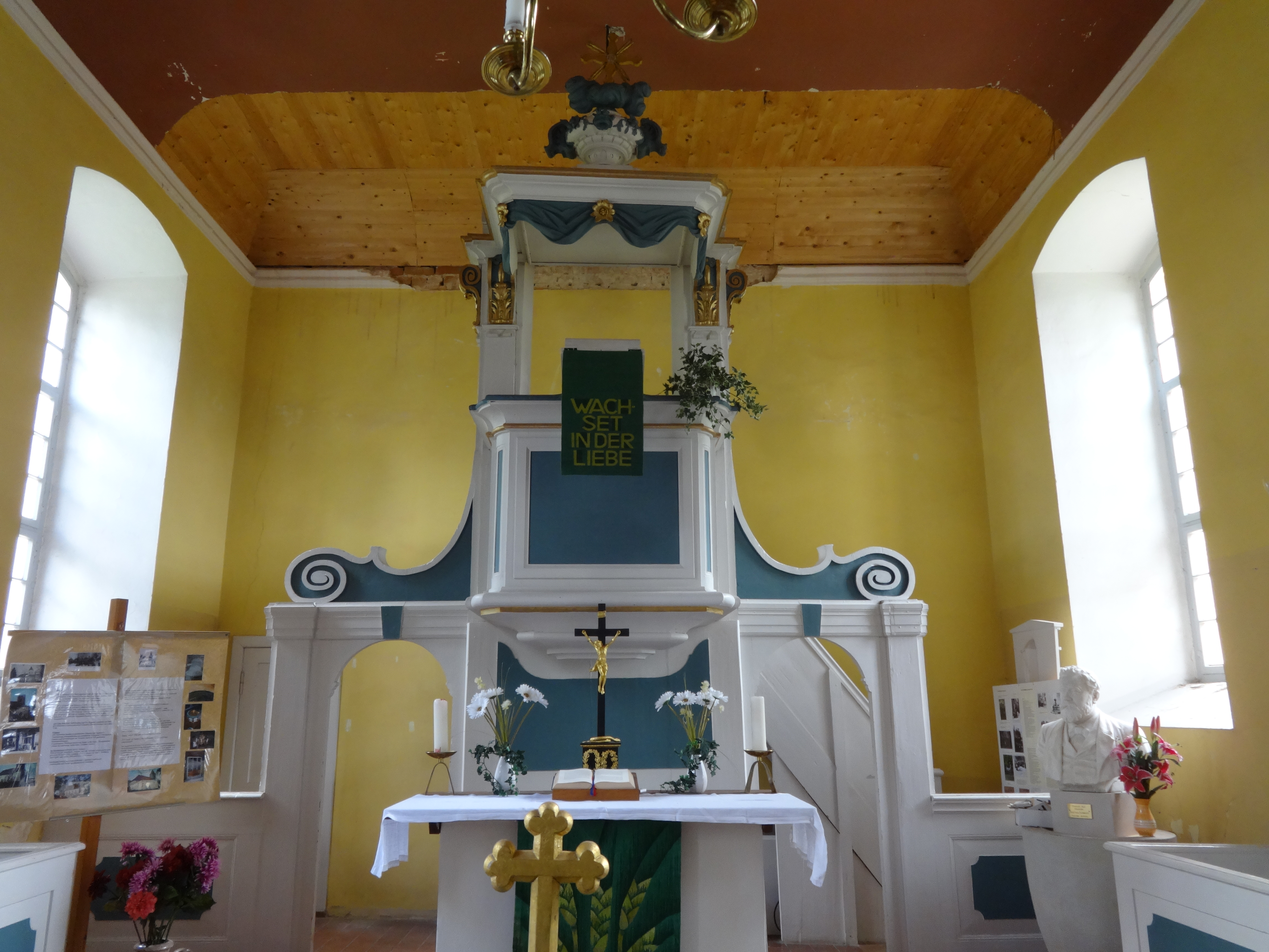 Die Dorfkirche Märkisch Wilmersdorf ist eine verputzte Saalkirche aus dem Anfang des 18. Jahrhunderts. Sie wurde 1746 um einen Kirchturm und ein Jahr später nach Osten hin um eine Gruft erweitert. Im Innern befinden sich eine schlichte Ausstattung aus der Bauzeit der Kirche sowie eine Fünte aus dem Jahr 1660.